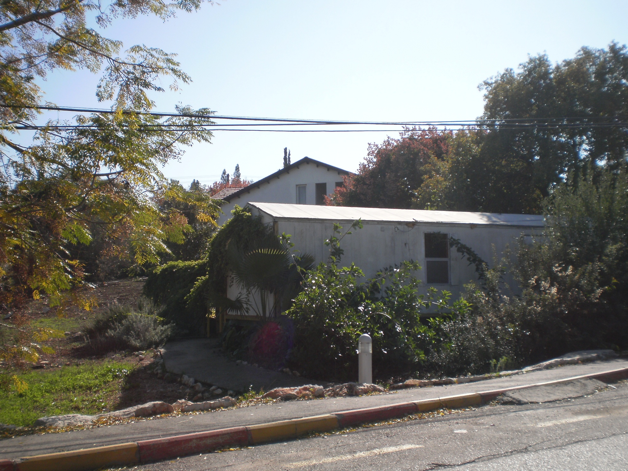 Alon Hagalil, Israel אלון הגליל, ישראל